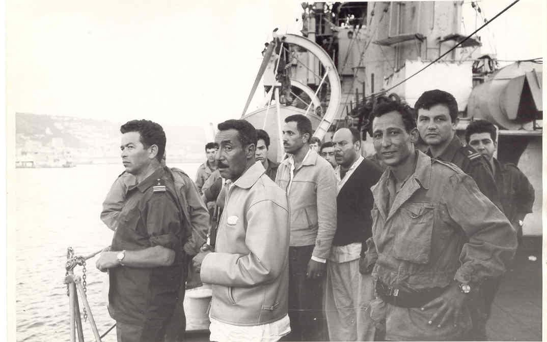 צוות אח"י חיפה עם קצינים מצריים שבויים שנמצאו בסירה